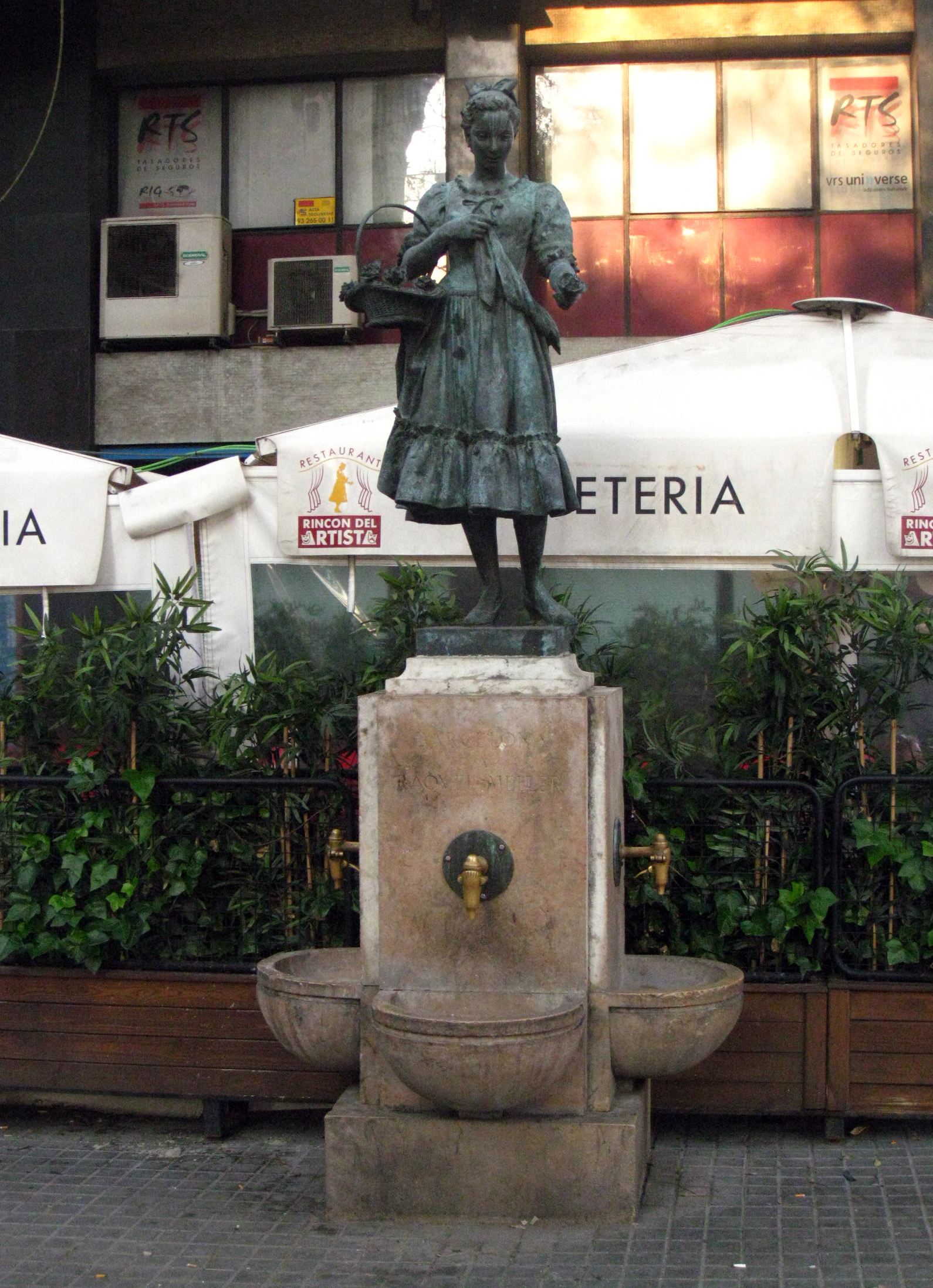 Font de la Violetera. C. Nou de la Rambla - av. Paral·lel (Barcelona)